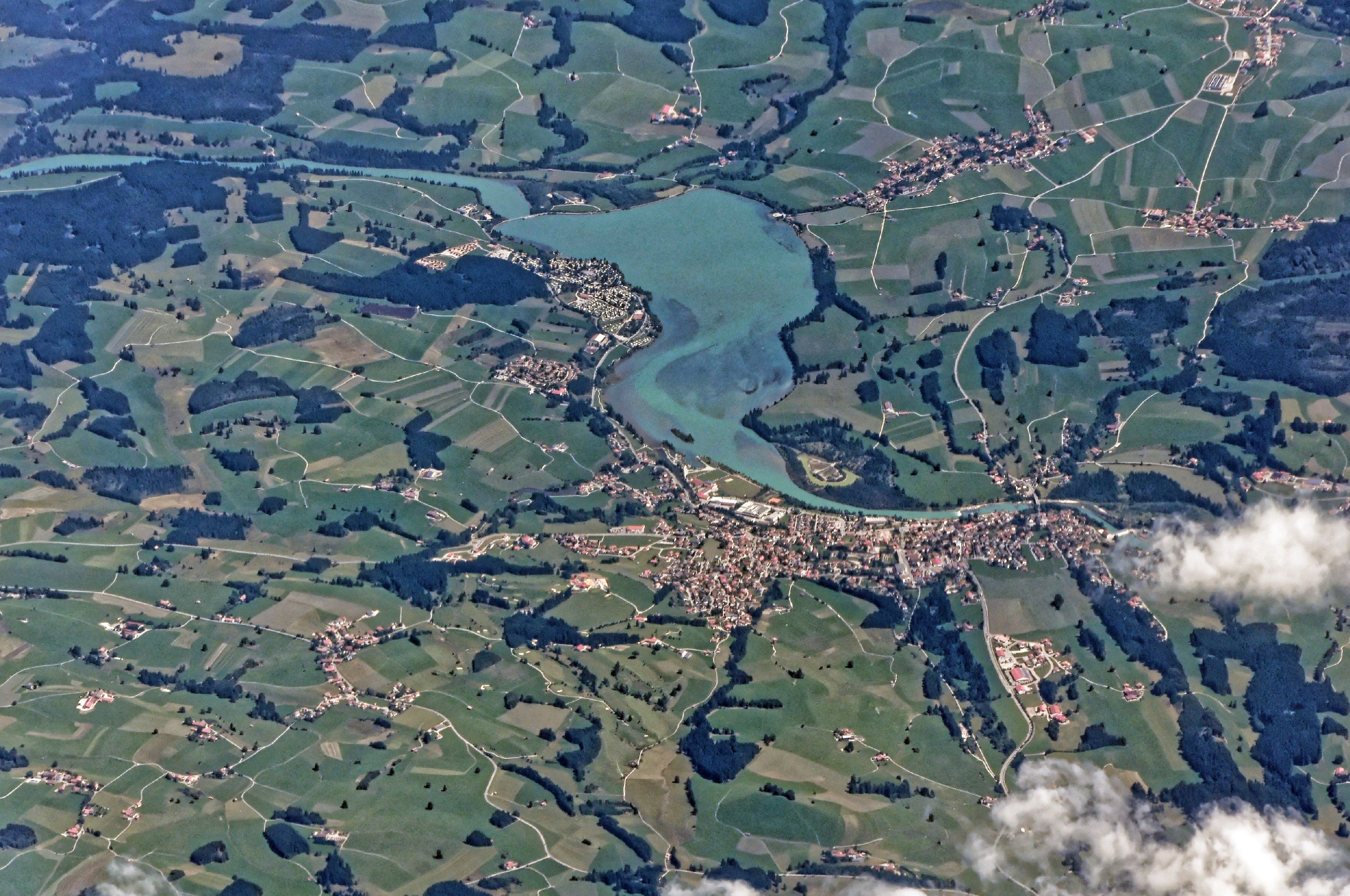 Bilder vom Flug -Rom-Düsseldorf-Hamburg 2013 Dieses Foto entstand in Zusammenarbeit mit Stadtbesichtigungen.de Die Seiten Stadtbesichtigungen.de, der dazugehörige Reise Blog sowie die Facebookseite: Stadtbesichtigungen Rom dürfen dieses Bild für Ihre Veröffentlichungen ohne den Hinweis auf Wikipedia, Commons bzw der Lizenz verwenden. Die Verantwortlichen habe von mir (Ra Boe) die Originaldaten zur freien Verfügung übermittelt bekommen.